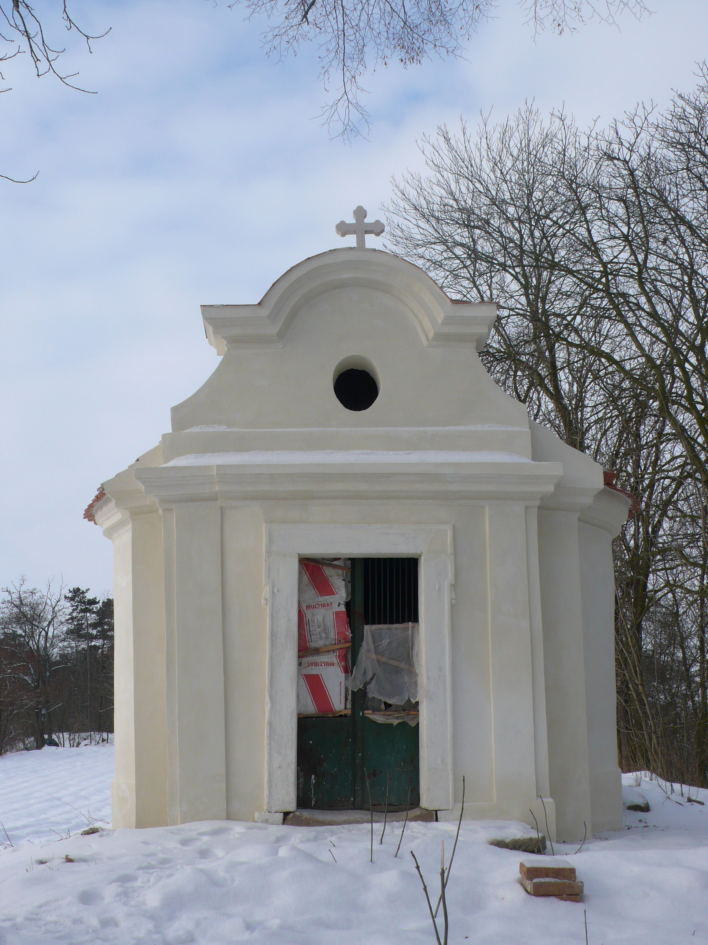 Kaple sv. Jana Nepomuckého (Jarpice), u silnice do Vyšínku, Jarpice